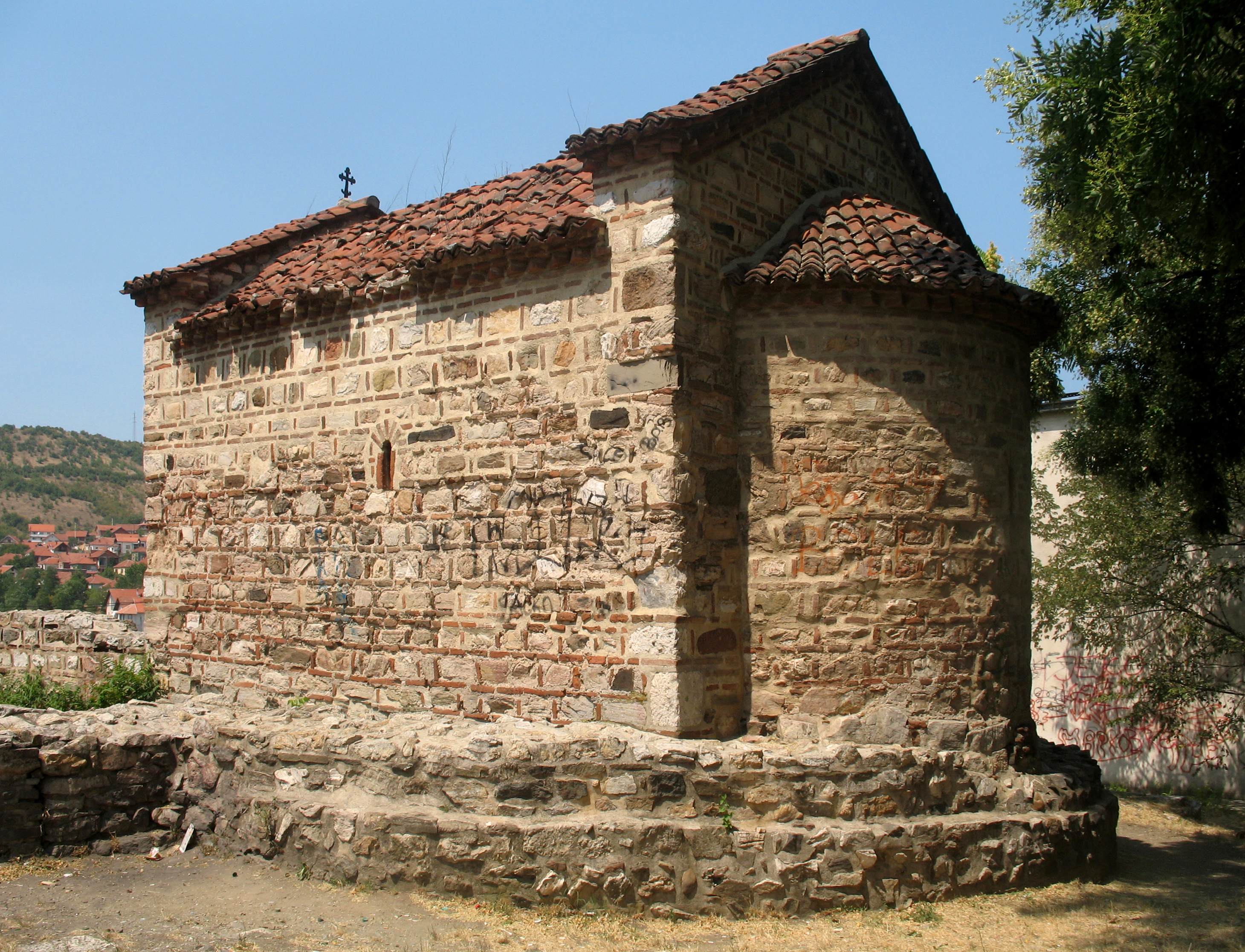 "Latin" church in Prokuplje